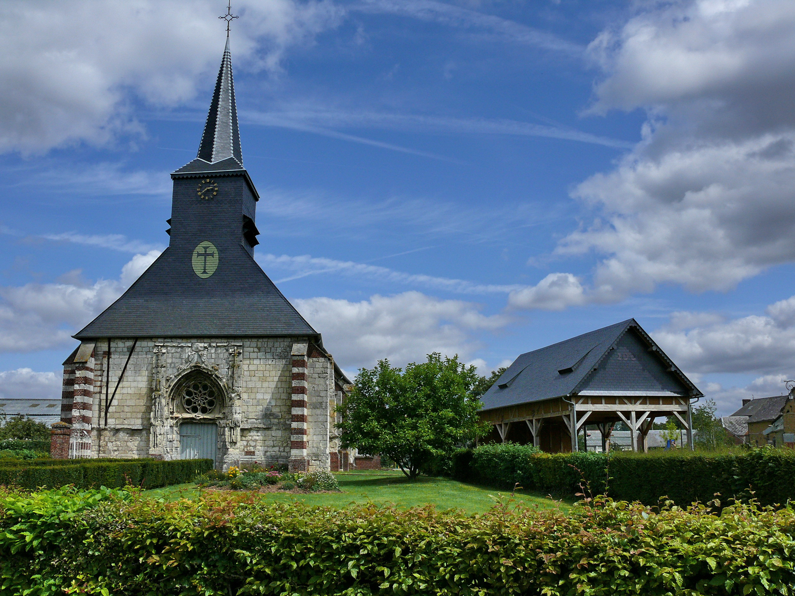 Beaudéduit